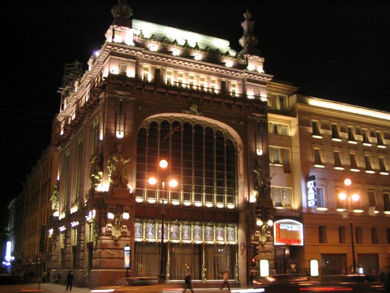 Дом торгового товарищества «Братья Елисеевы» г. Санкт-Петербург